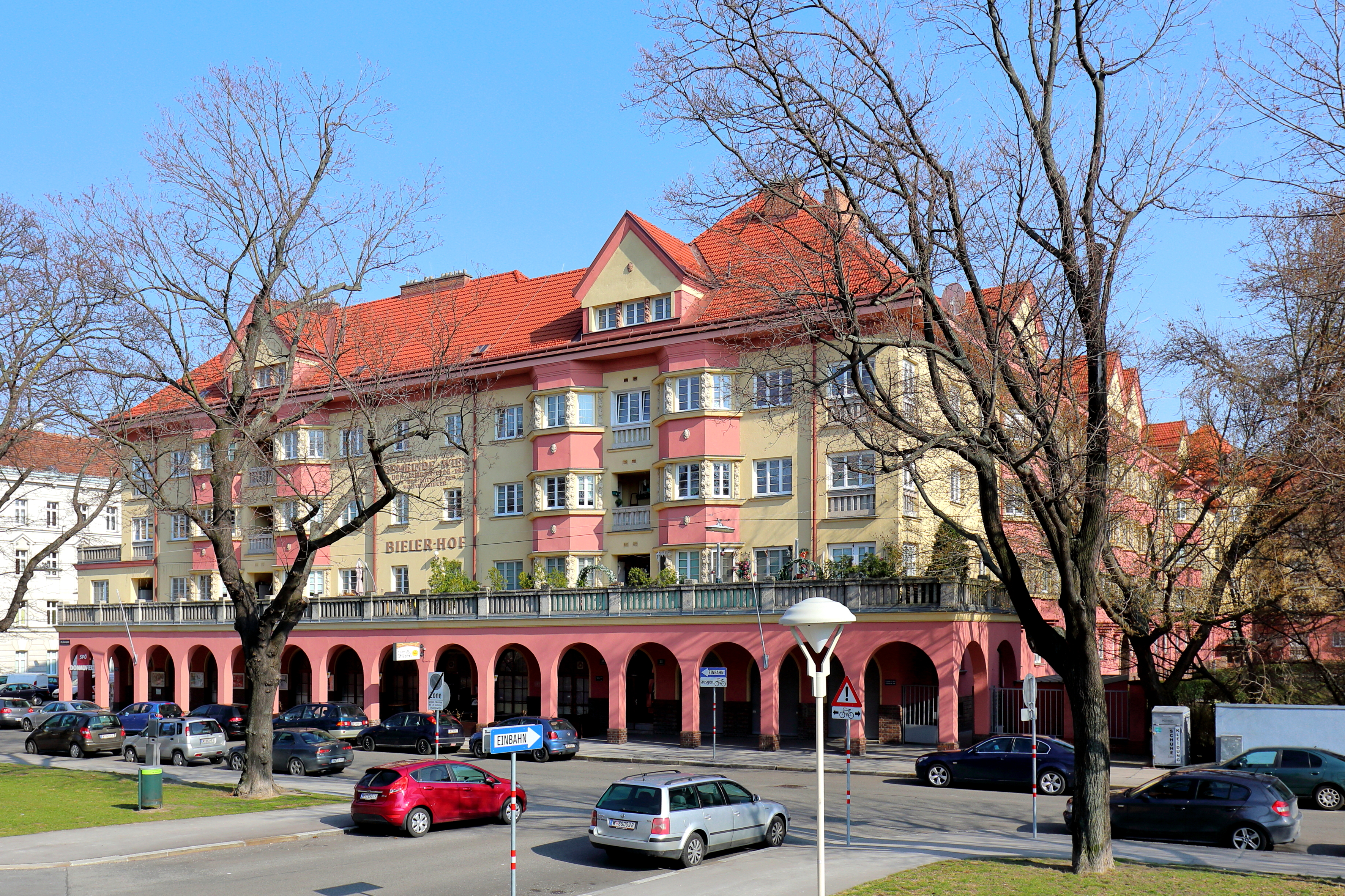 Der denkmalgeschützte Gemeindebau Bieler-Hof an der Adresse Kinzerplatz 10-11 im 21. Wiener Bezirk Floridsdorf.Die Wohnhausanlage mit einem hakenförmigen Grundriss und rund 100 Wohneinheiten wurde von 1926 bis 1927 nach Plänen von Adolf Stöckl errichtet. Der Gemeindebau erhielt seinen Namen im Jahr 1947 zu Ehren der Schweizer Stadt Biel, deren Einwohner nach dem Zweiten Weltkrieg eine großzügige Hilfsaktion für die Floridsdorfer Bevölkerung eingeleitet hatten.